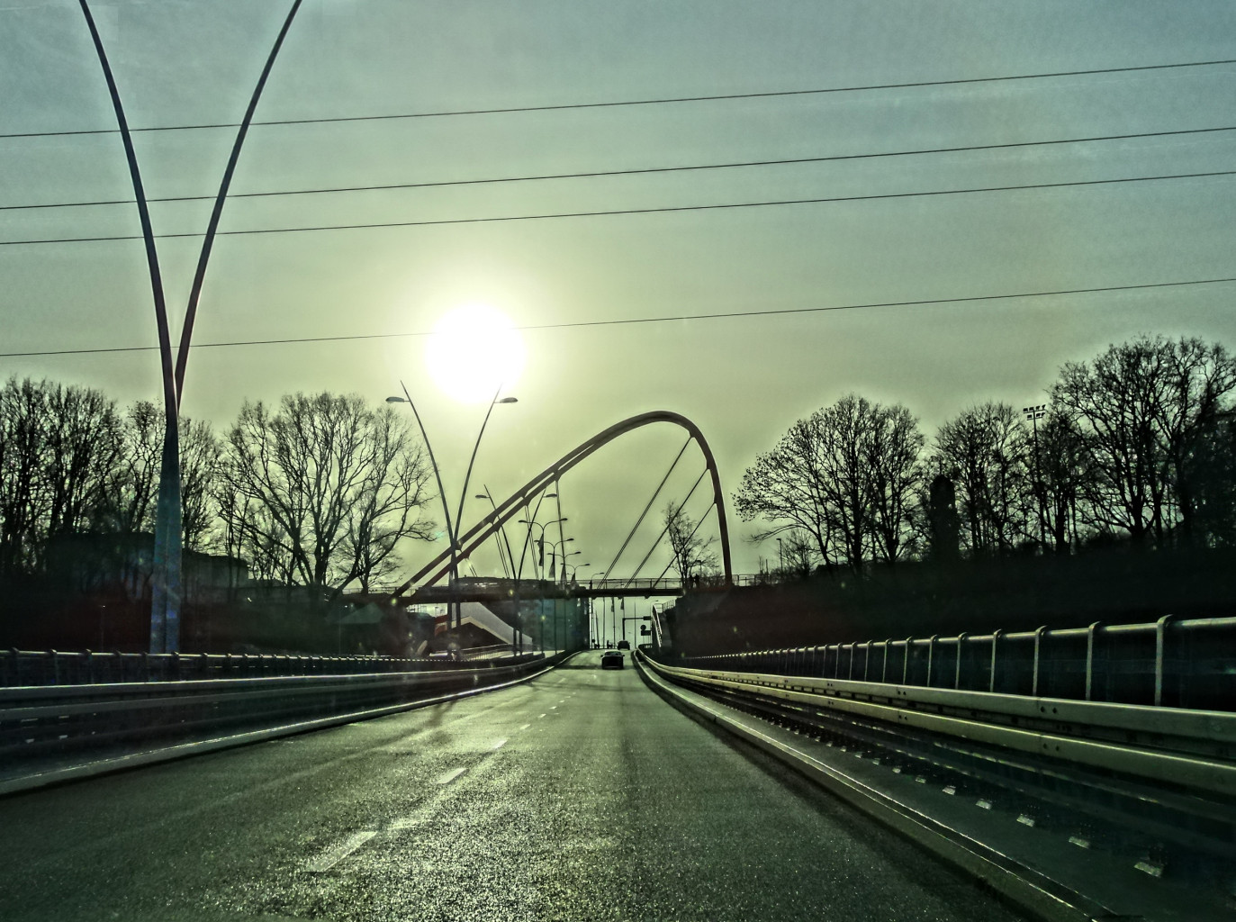 Trasa Uniwersytecka w Bydgoszczy